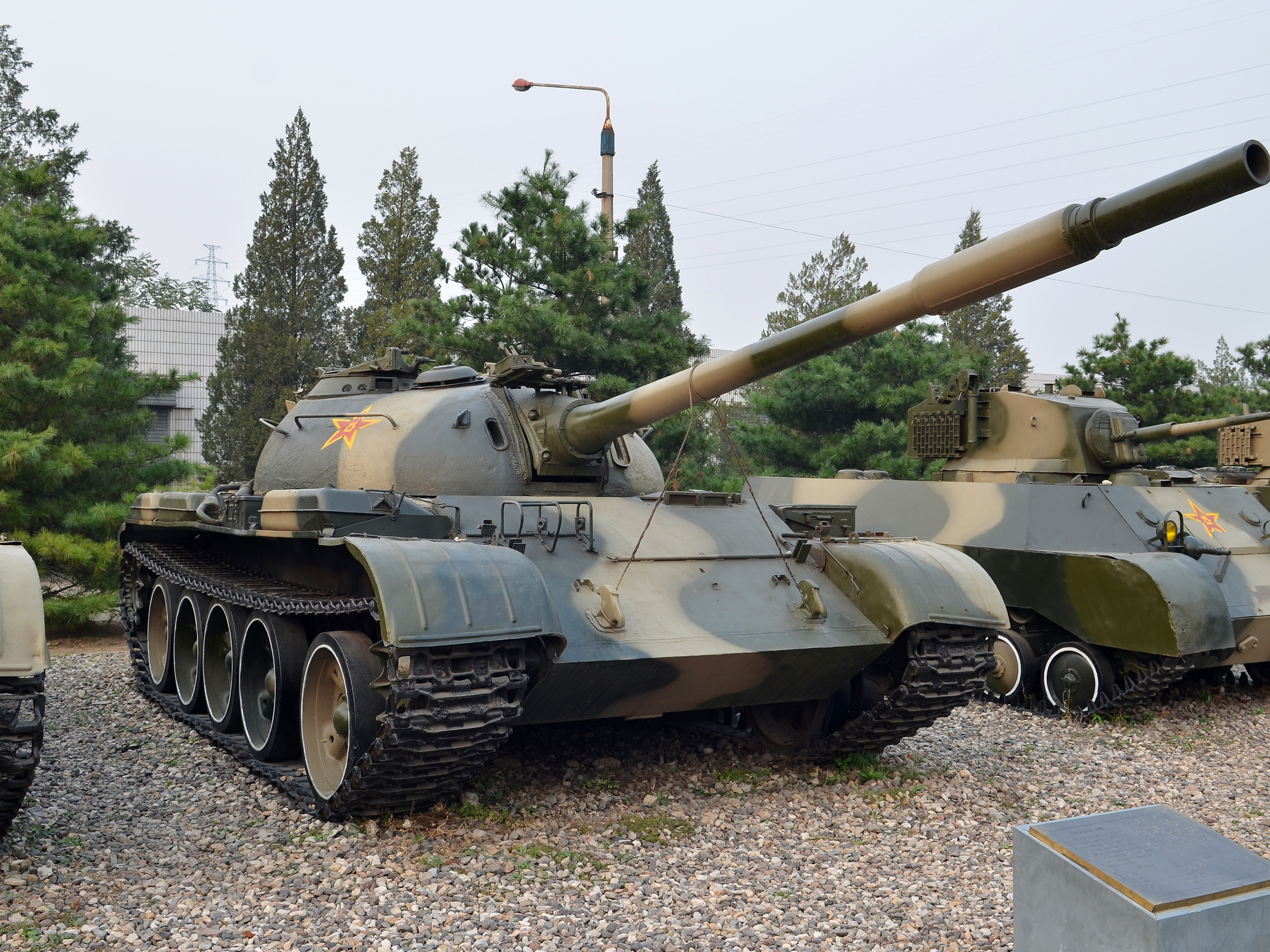 保存在中国人民解放军坦克博物馆的69式坦克